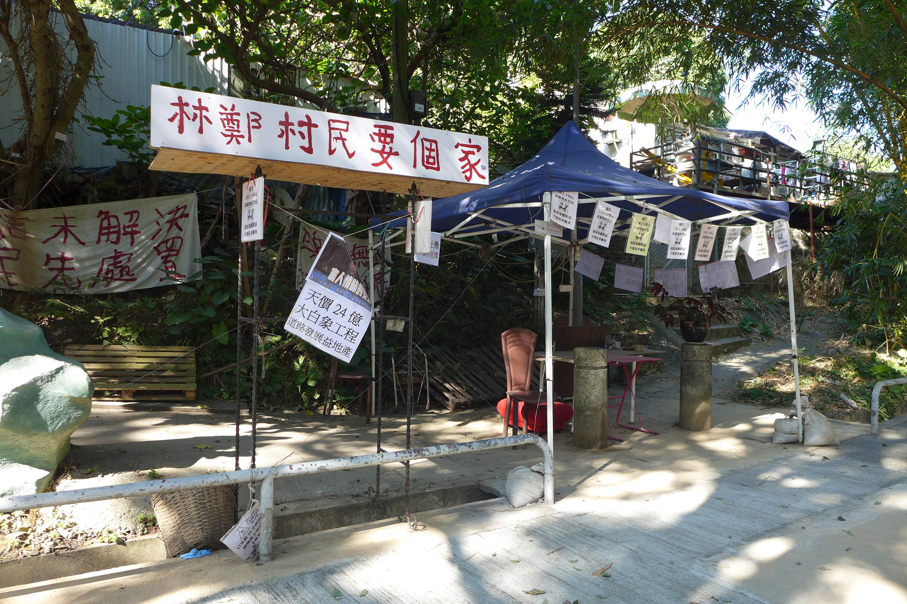 Wang Chau residence against development